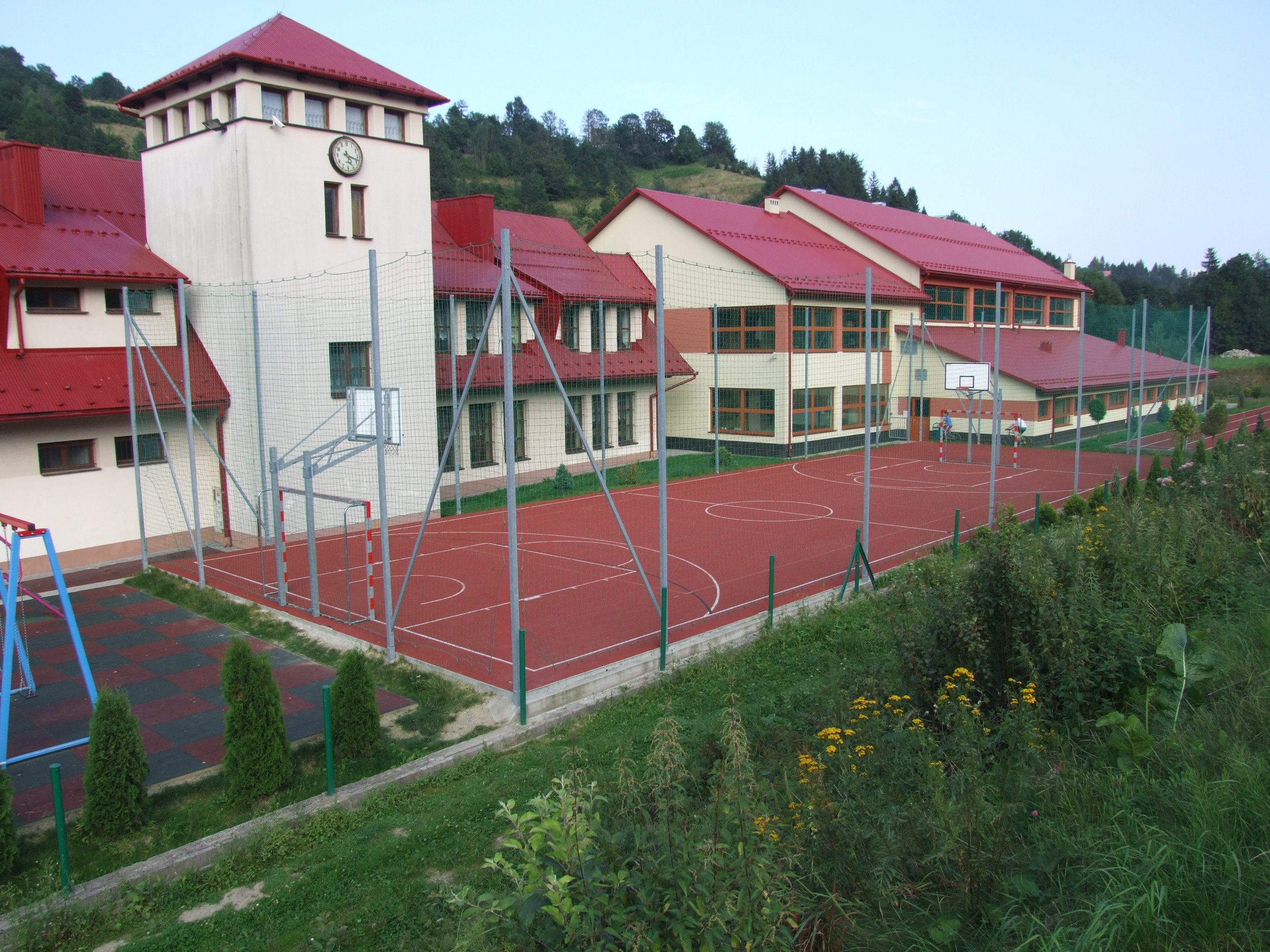 Zespół szkół w Lubomierzu